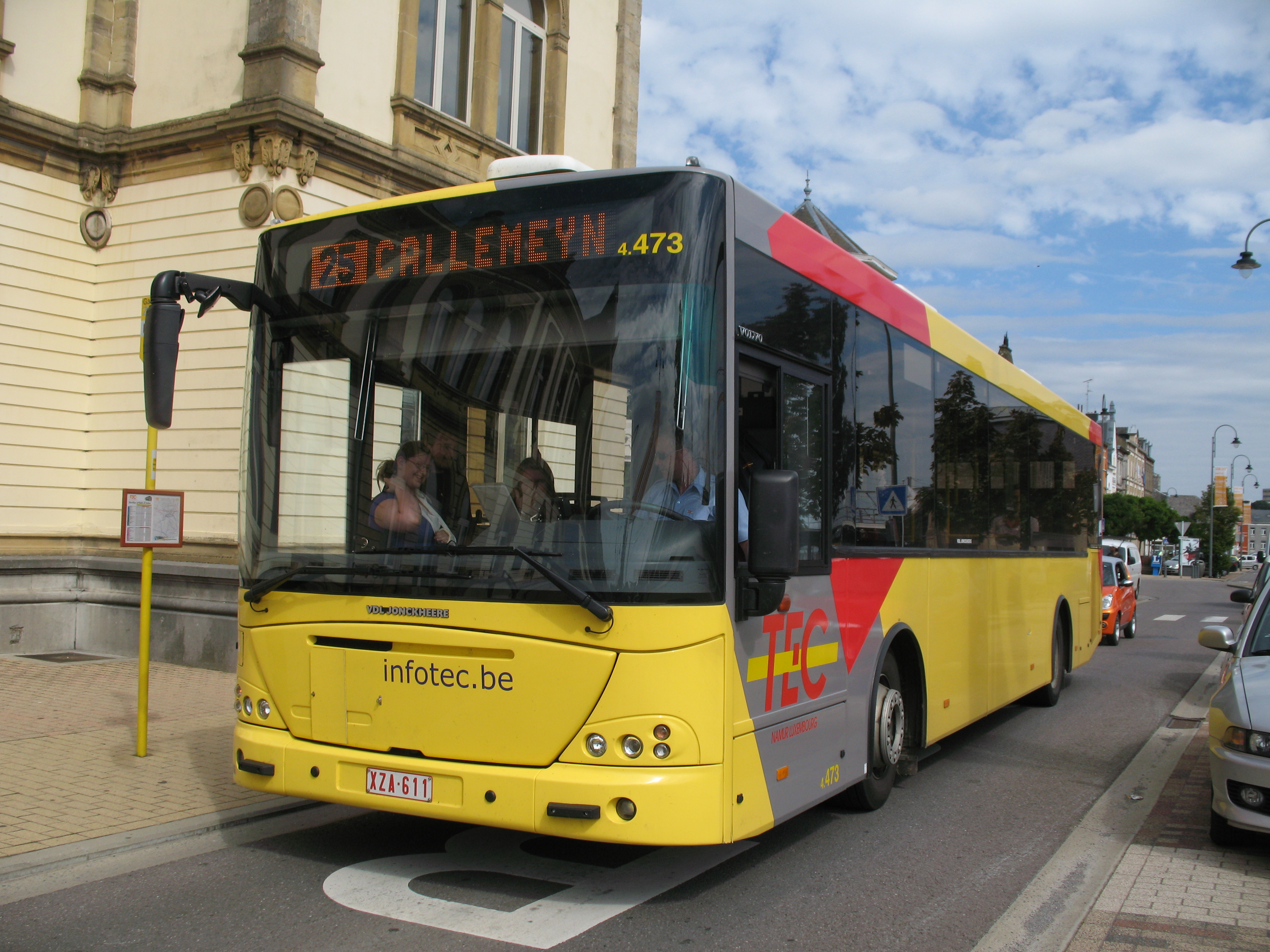 BUS TEC Namur-Luxembourg à la Gare d'Arlon (B).